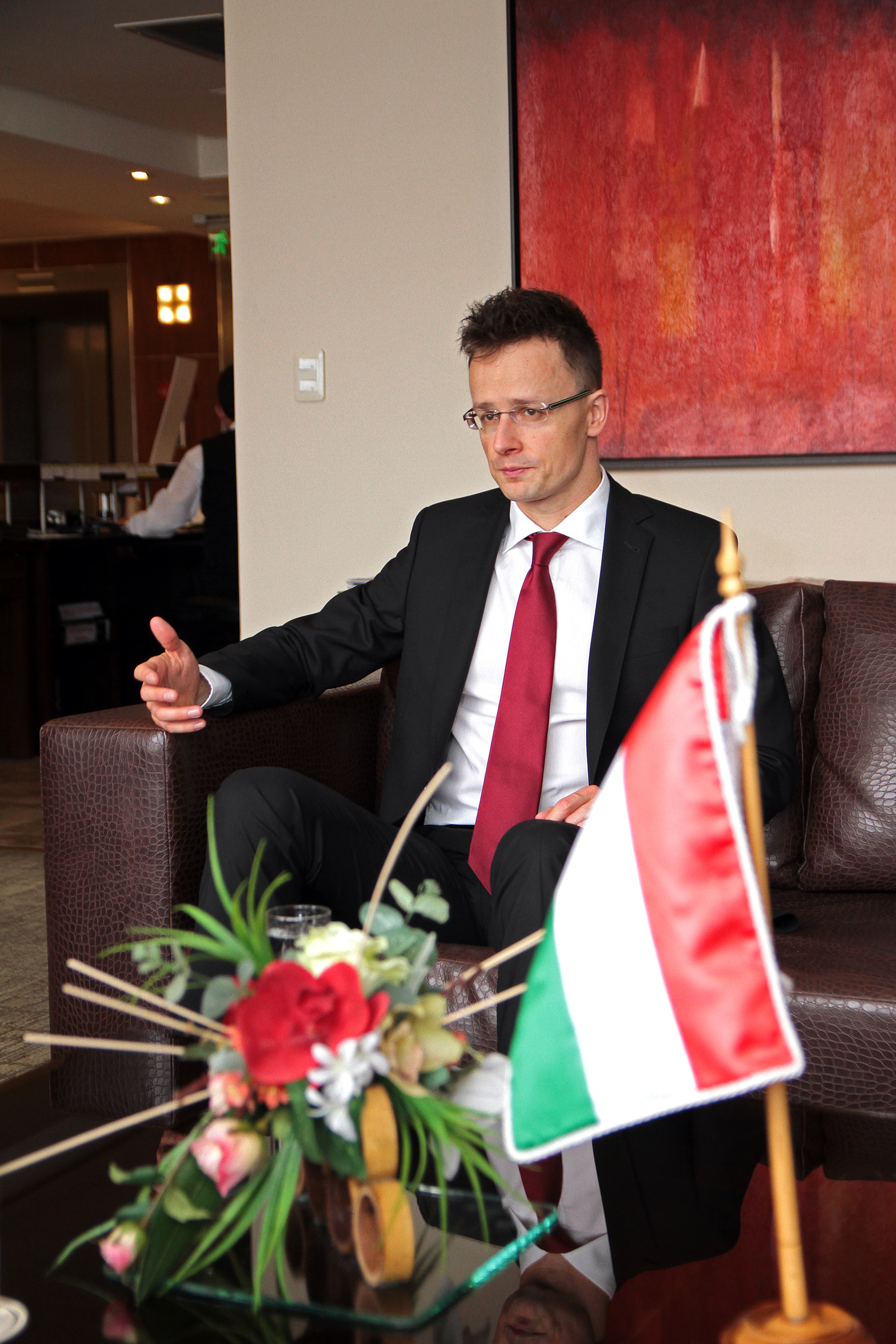 Quito, 25 mar (ANDES).- Péter Szíjjartó, ministro de asuntos exteriores y comercio de Hungría, visita Ecuador para fomentar lazos bilaterales de comercio. Fotogrfías: Carlos Rodríguez/ANDES.